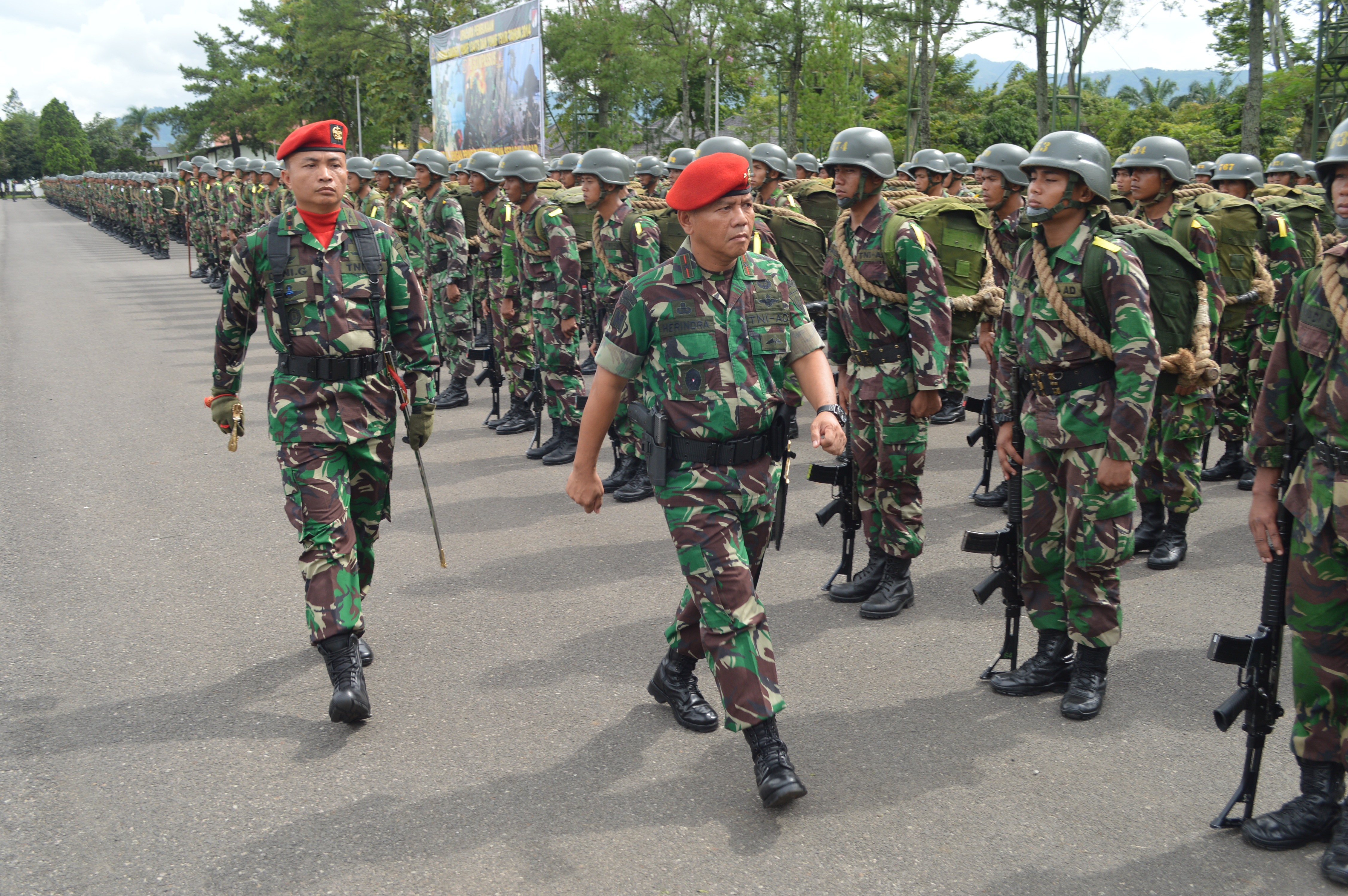 Upacara pembukaan Latihan Raider Yonif 134/TS Tahun 2014